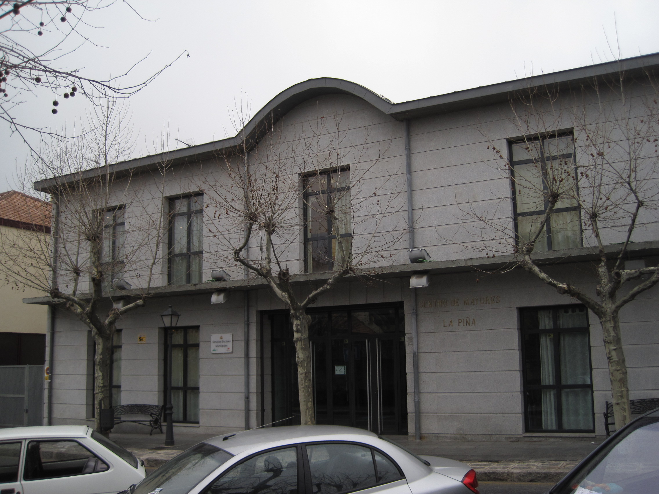 Centro de mayores en El Escorial (Madrid, España).